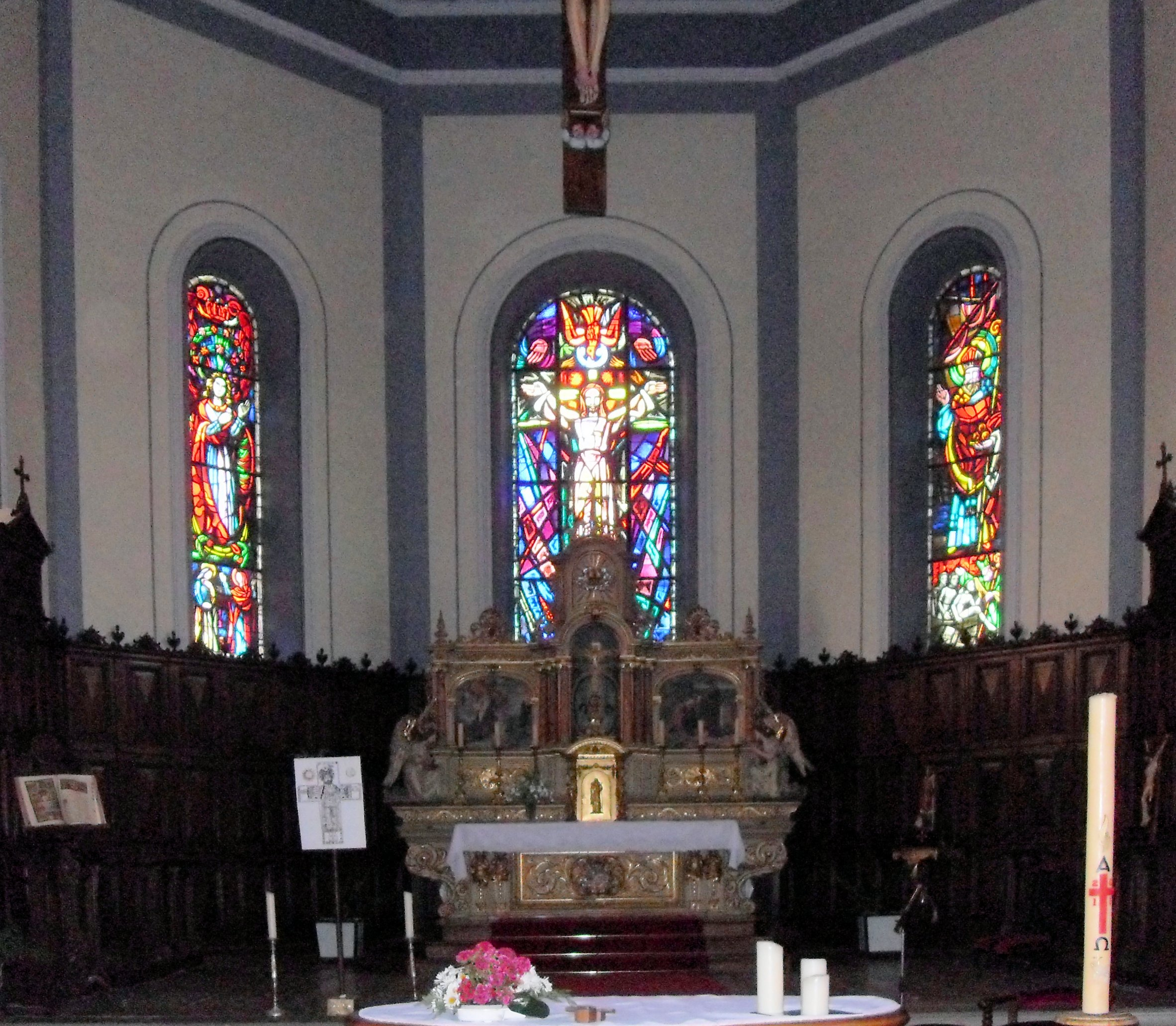 Lintérieur de l'église Saint-Nicolas à Widensolen